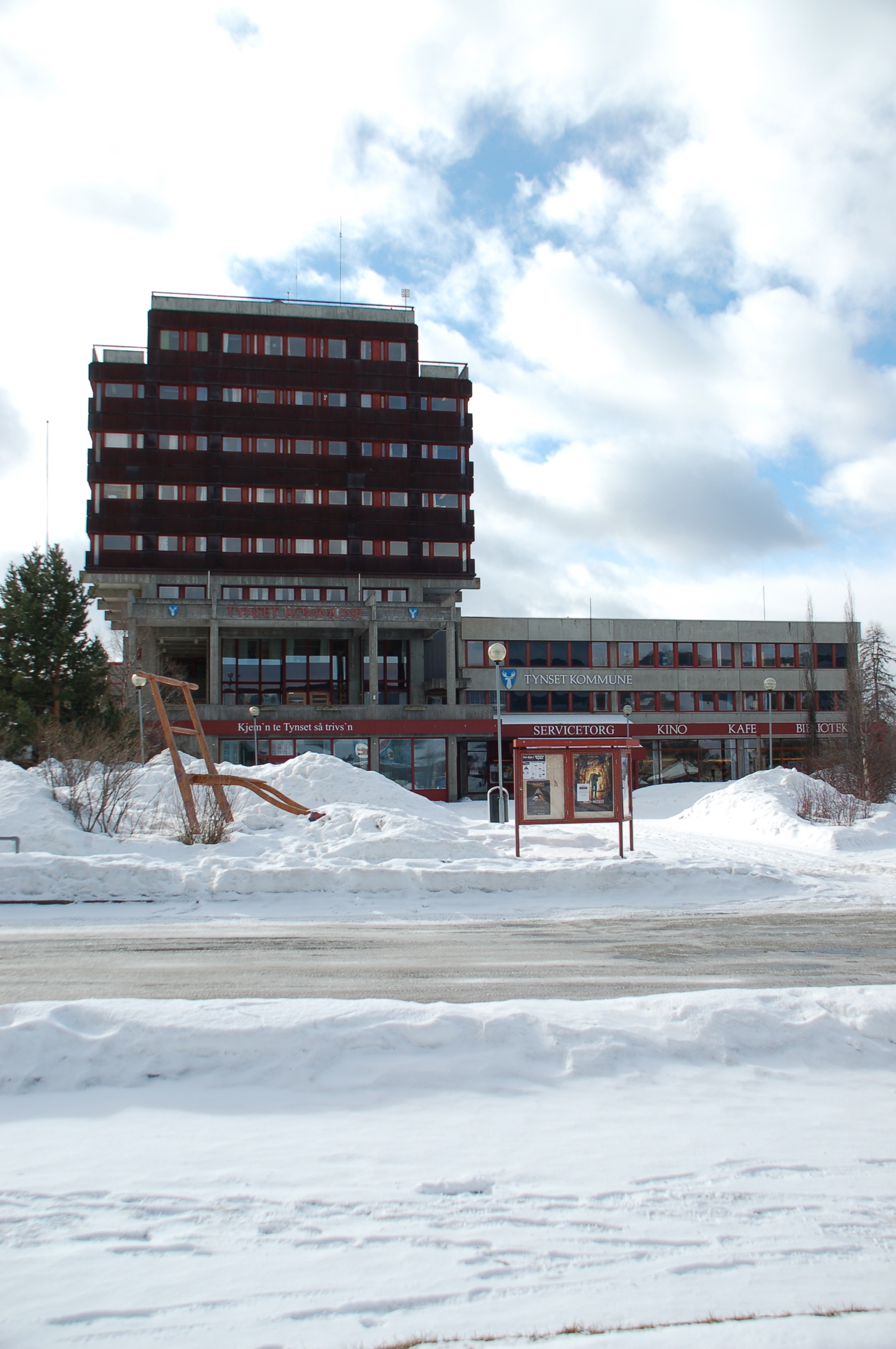 Tynset rådhus, Tynset, Hedmark, Norway